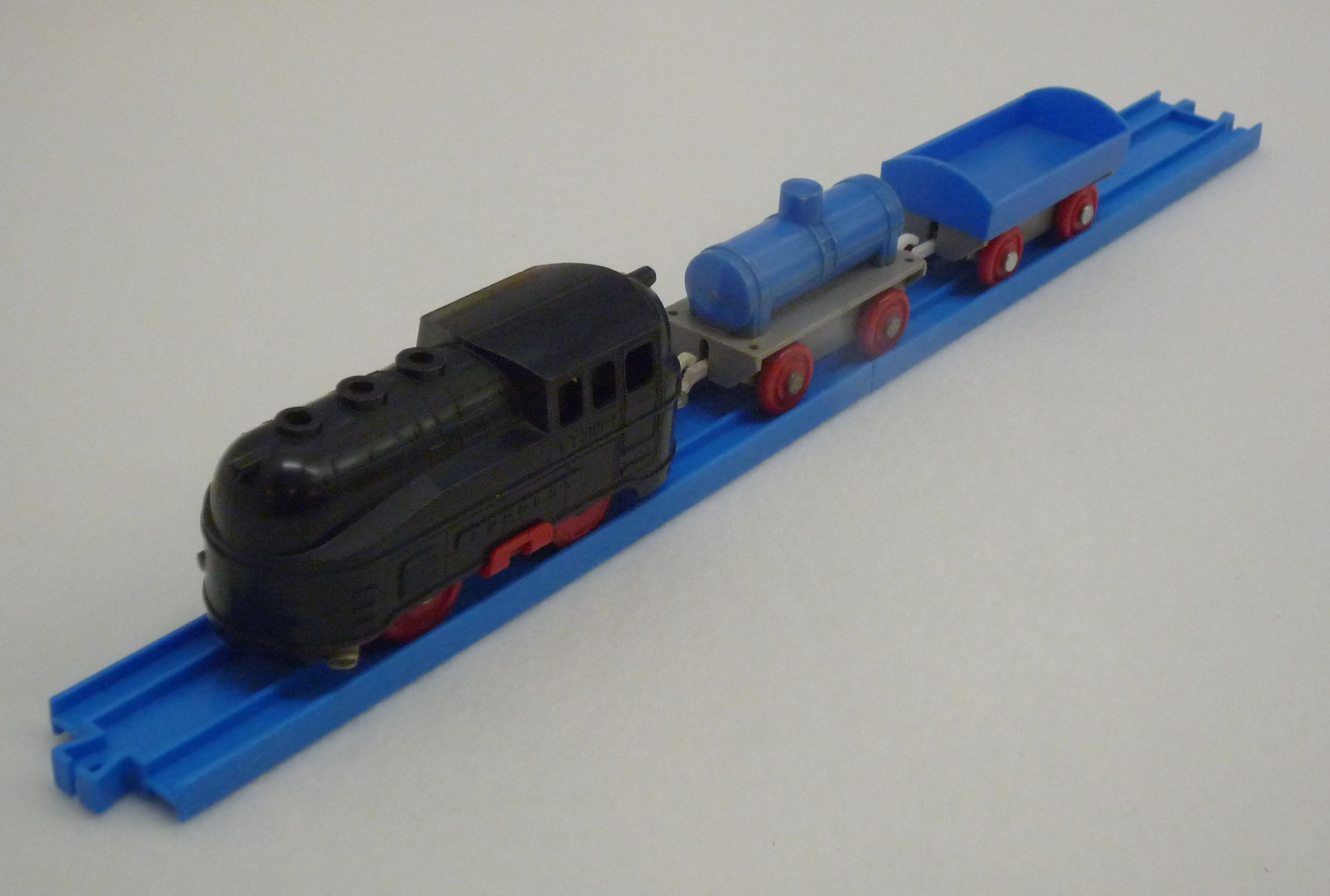 プラレール 電動プラ汽車セット 1961年